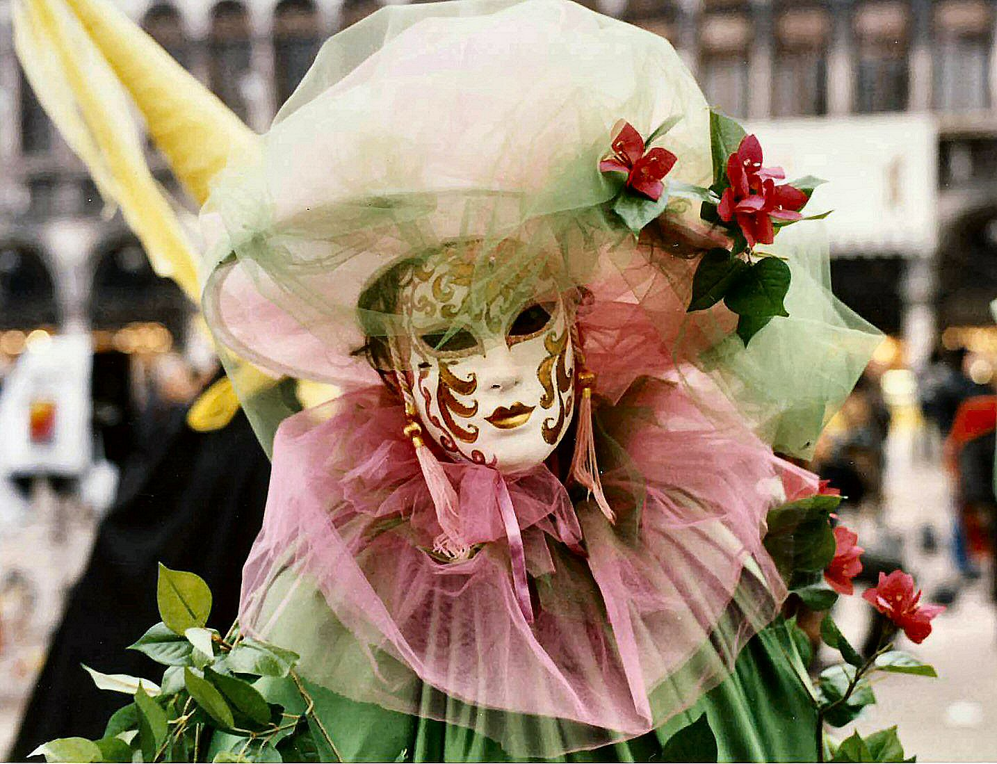 Carnival of Venice/Carnaval de Venise